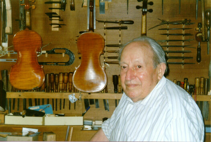 Arnaldo Morano nel suo laboratorio